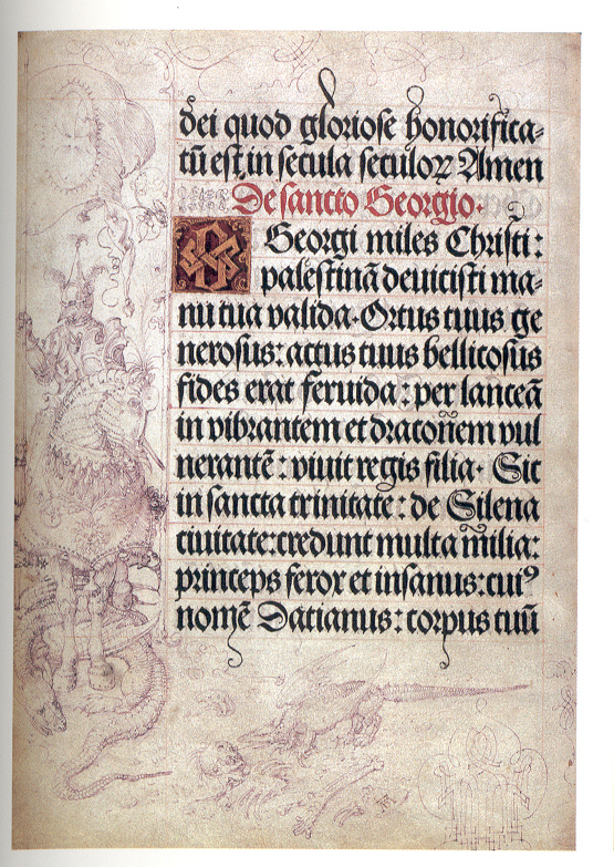 Das Gebetbuch Kaiser Maximilians I., hier Randzeichnung (Feder)